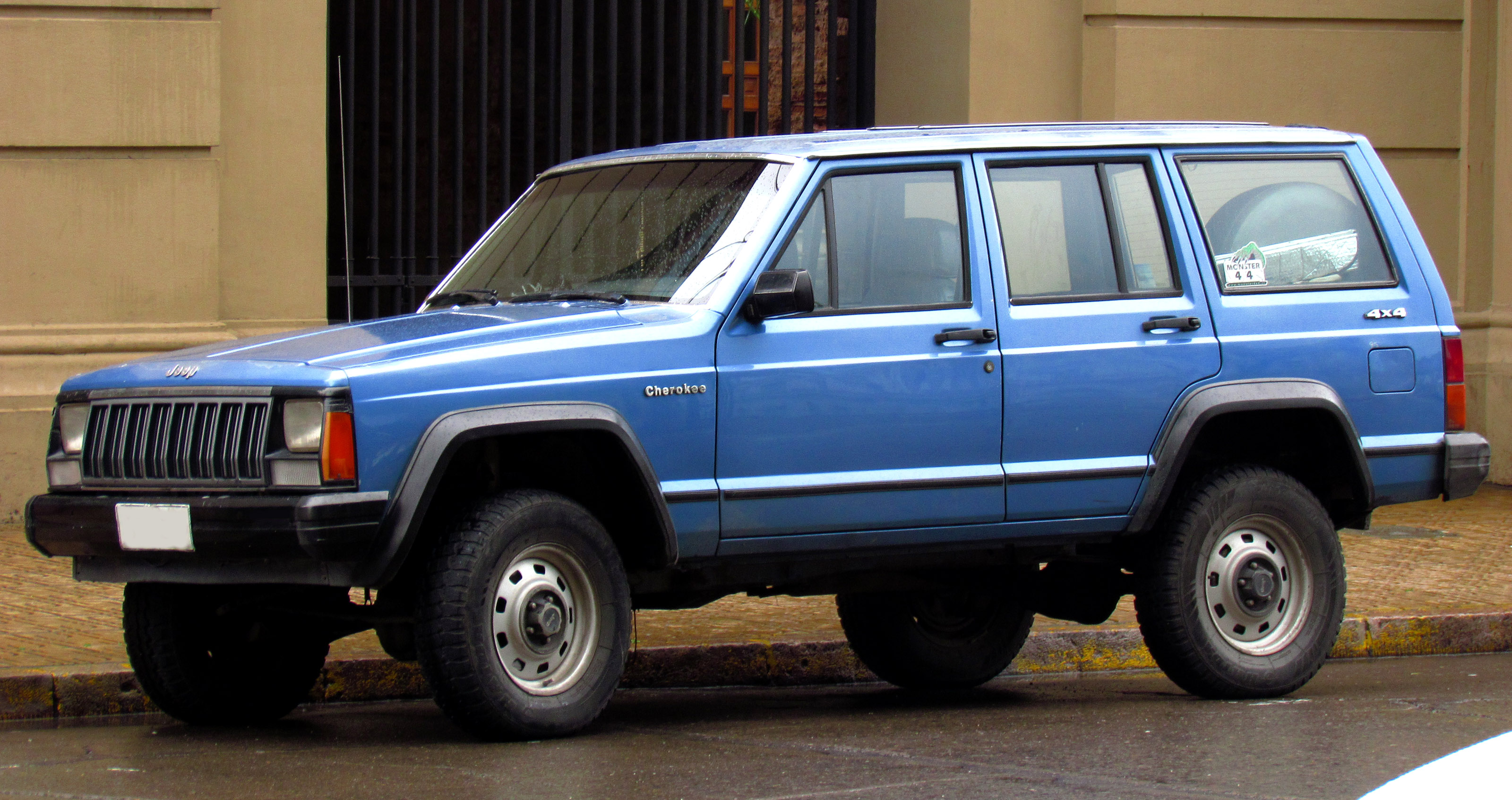 Jeep Cherokee 2.5 1988